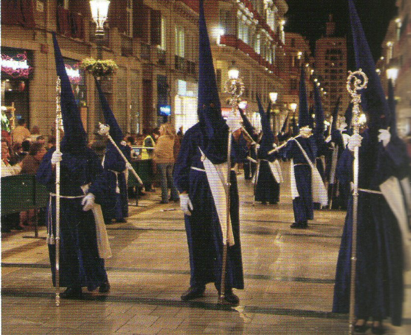 Nazarenos de la sección de la Estrella